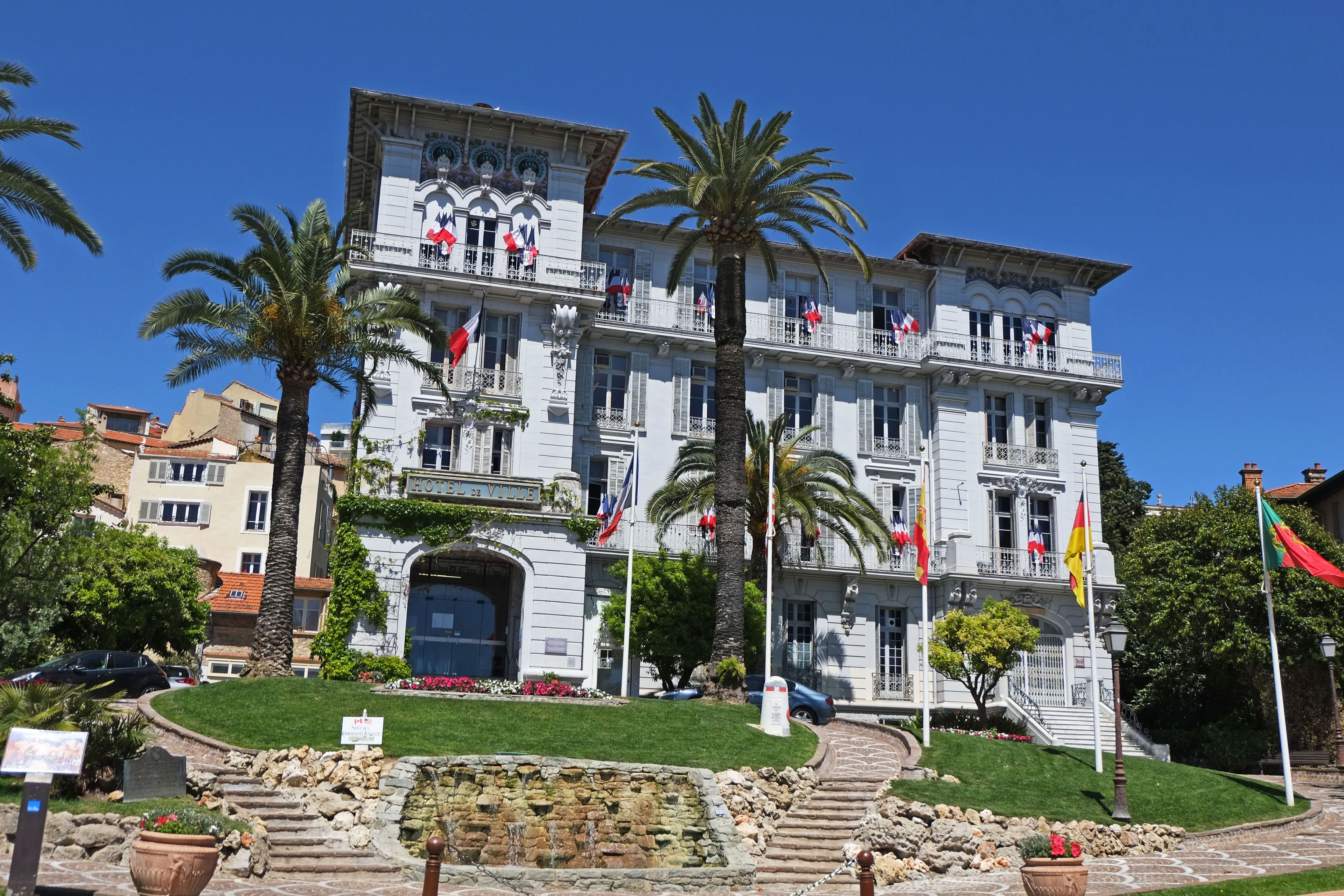 L'kôtel de ville du Cannet